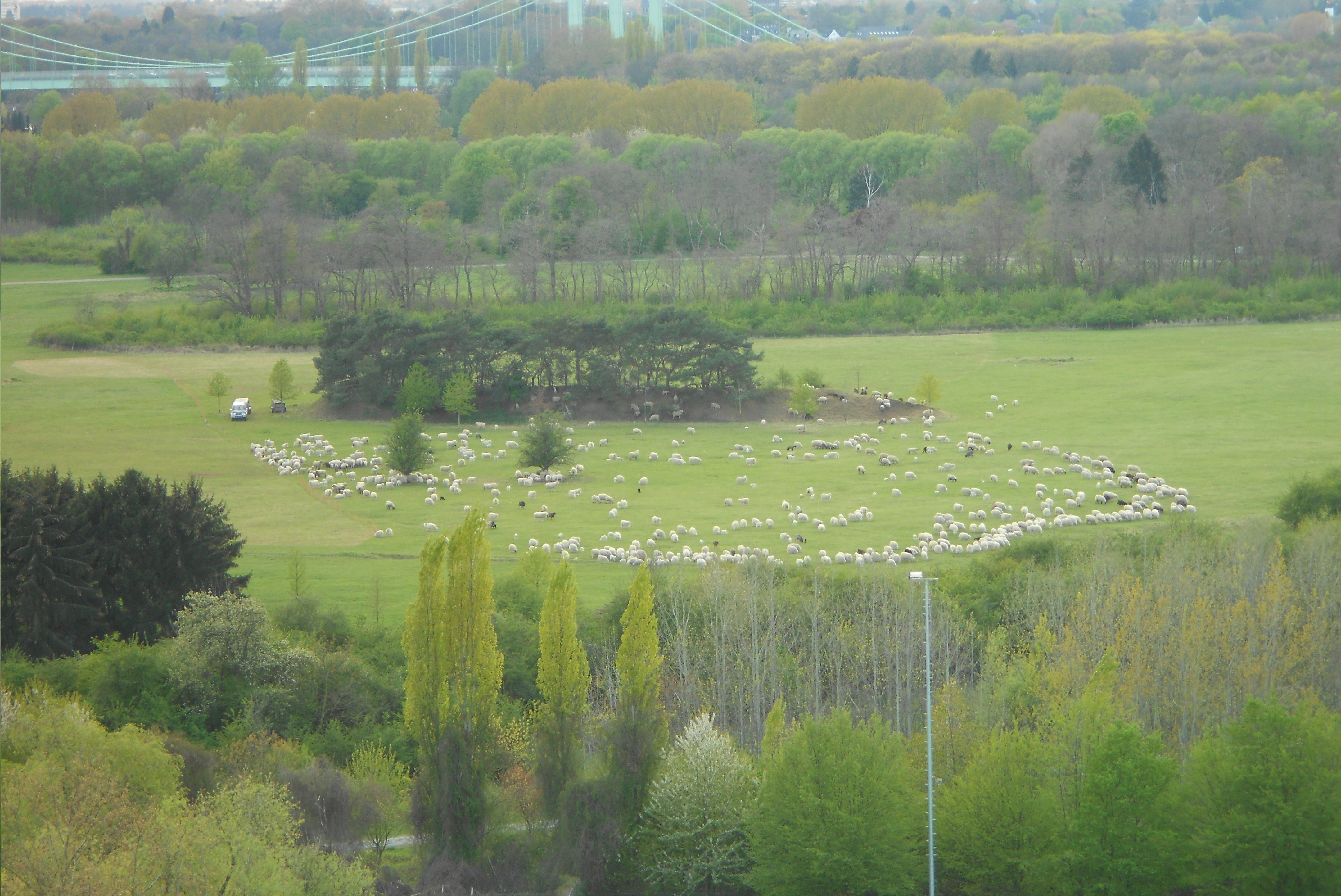 Das Foto zeigt eine Schafherde und seinen Hirten in der Westhovener Aue.